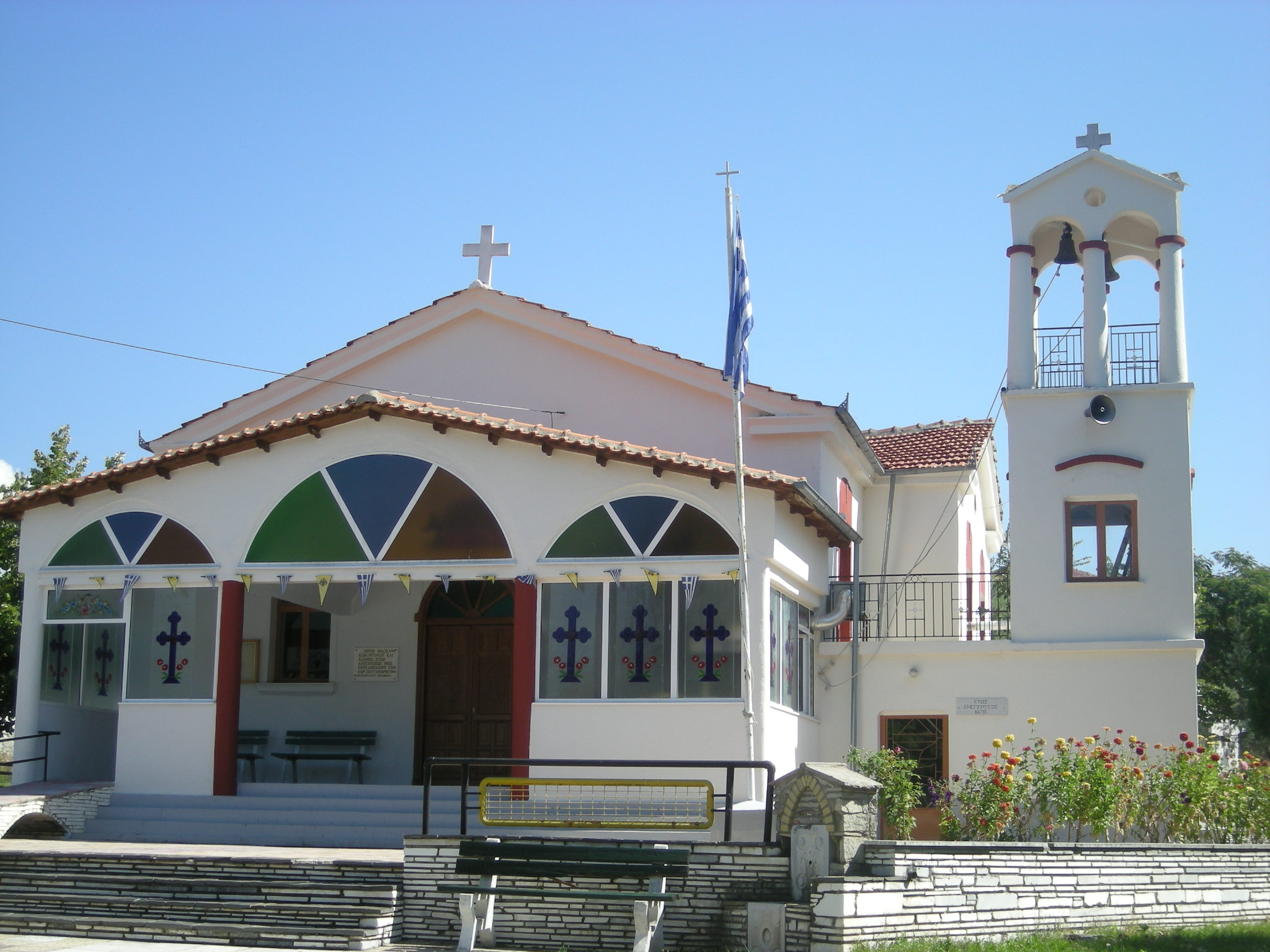 Εκκλησία των Ποταμιών Δράμας